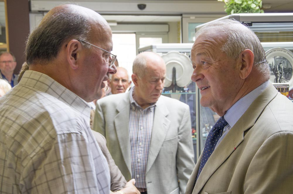 Robert Lelangue (links) samen met voormalige Tourbaas Jean-Marie Leblanc op de opening van de tentoonstelling "Honderd Ronden Retro" in het woonzorgcentrum Zonnebloem te Gent-Zwijnaarde.